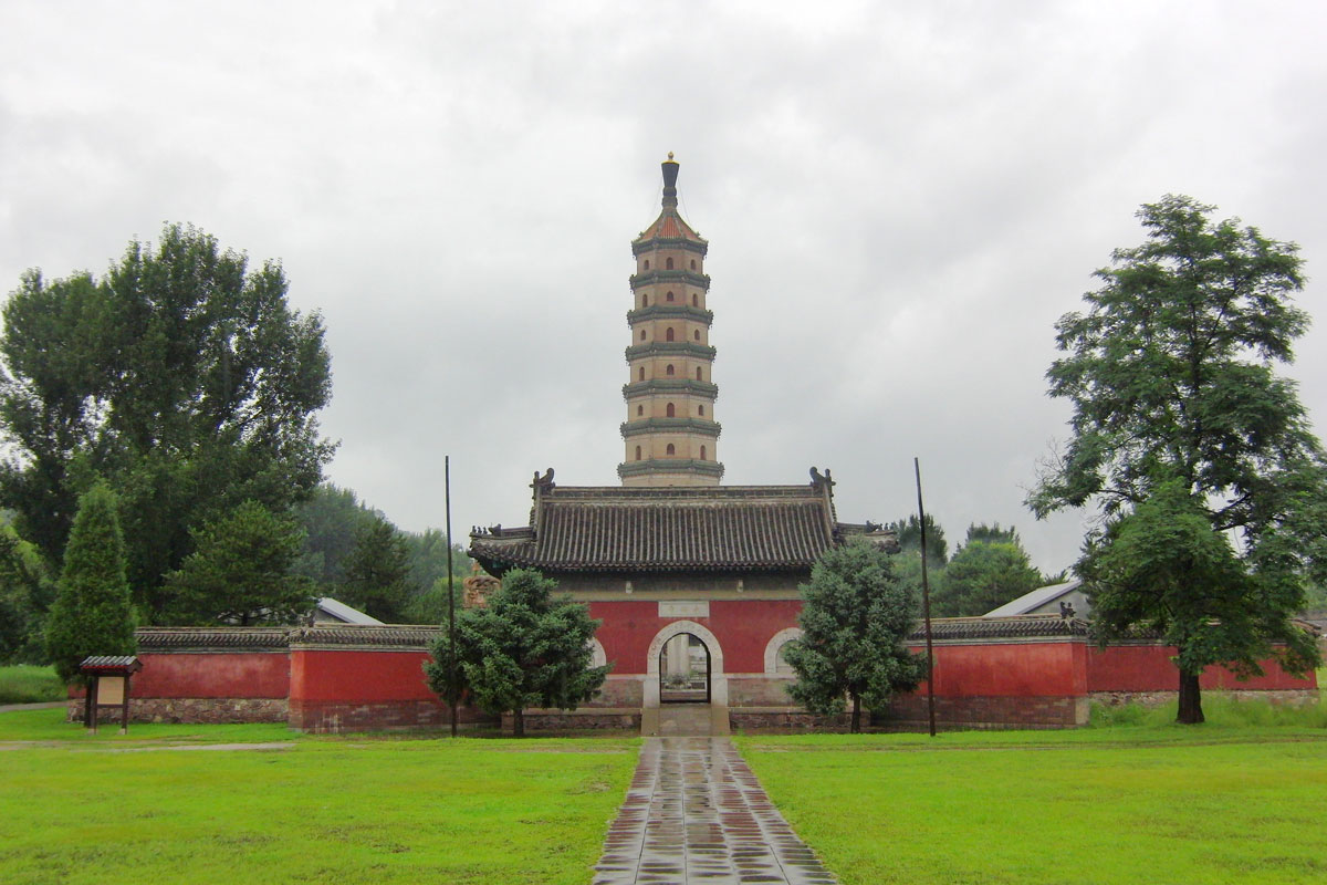 Храм Вечного Благословения с 66-метровой пагодой. Это семейный храм императорской династии Цин. Пагода насчитывает 9 этажей, что, согласно китайской науке о нумерологии, соответствует императорскому числу.